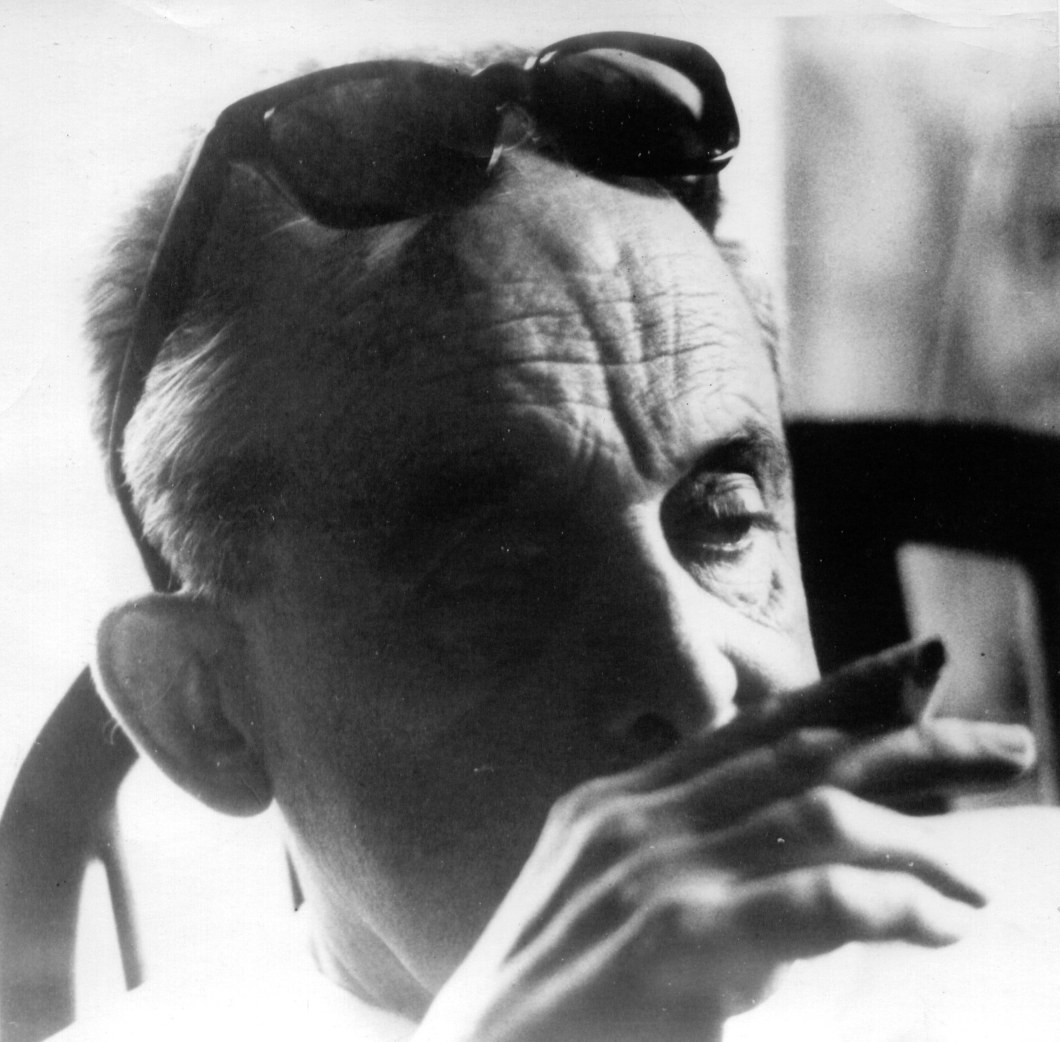 Ritratto fotografico di Luigi Vagnetti